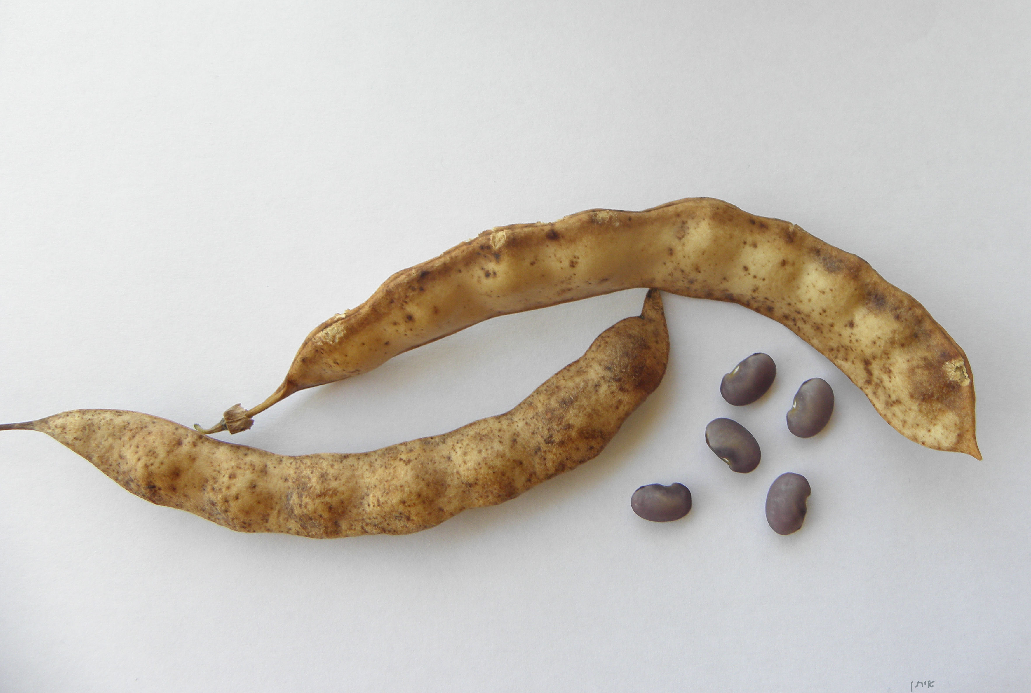 Mediterranean Stinkbush צחנן מבאיש, תרמילים וזרעים